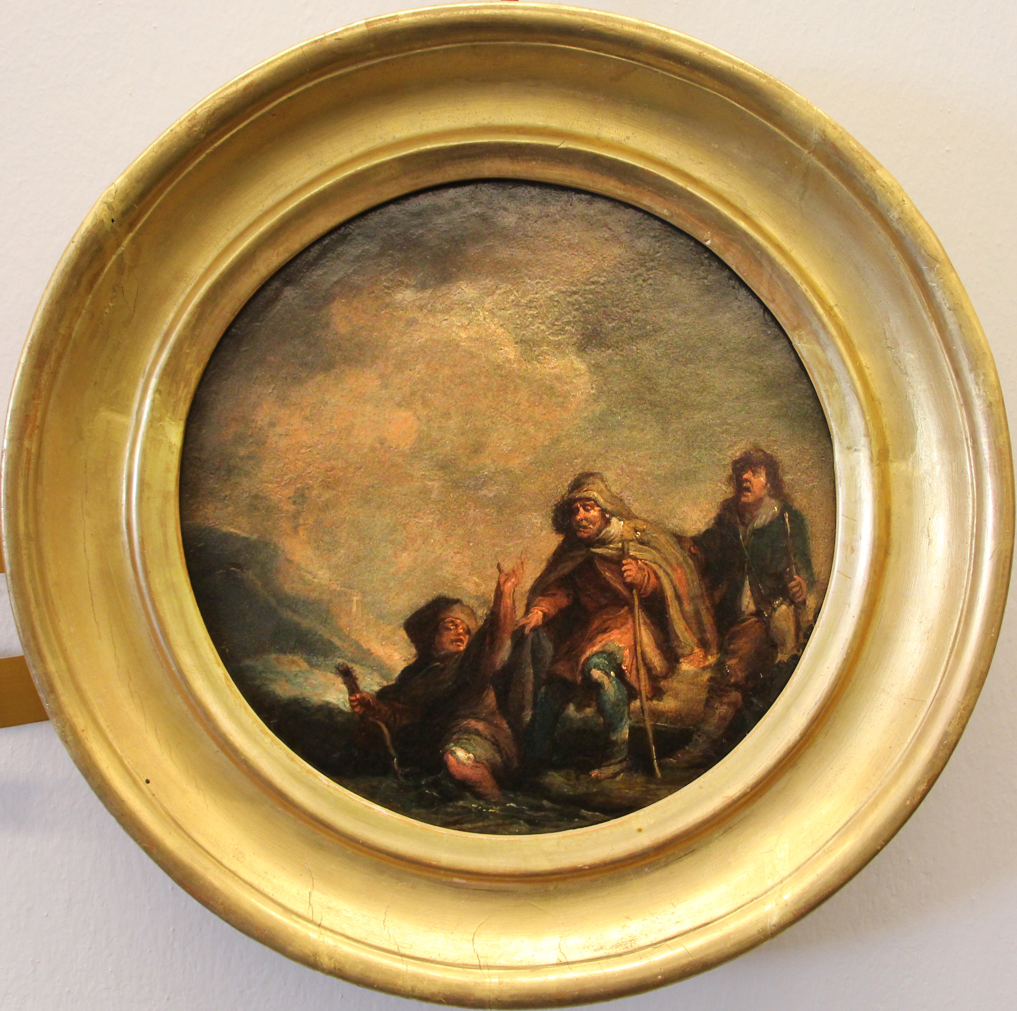 Palazzo Bianco o Palazzo Doria Brignole - Musei di Strada Nuova The making of this document was supported by Wikimedia CH. (Submit your project!) For all the files concerned, please see the category Supported by Wikimedia CH. This is a photo of a monument which is part of cultural heritage of Italy.